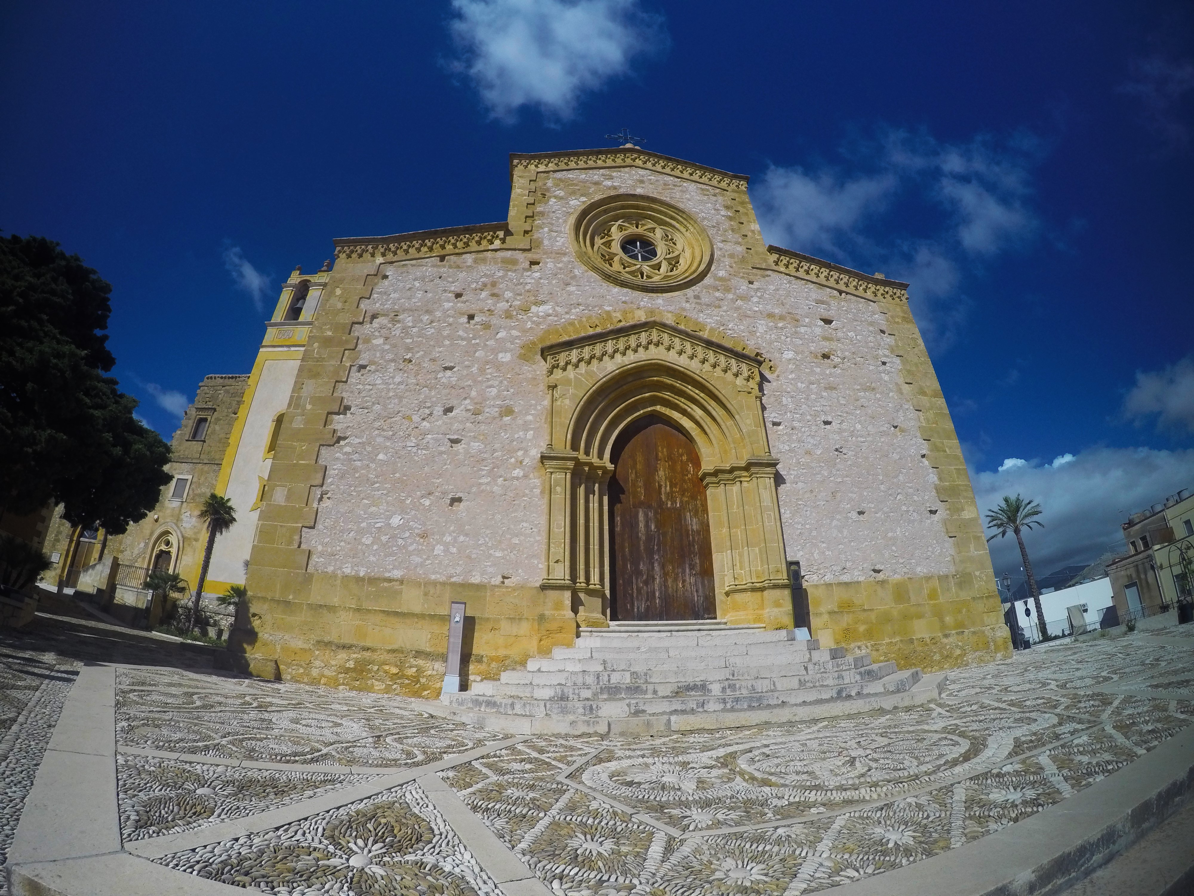 Custonaci - Santuario di Maria SS. di Custonaci Custonaci - Santuario di Maria SS. di Custonaci